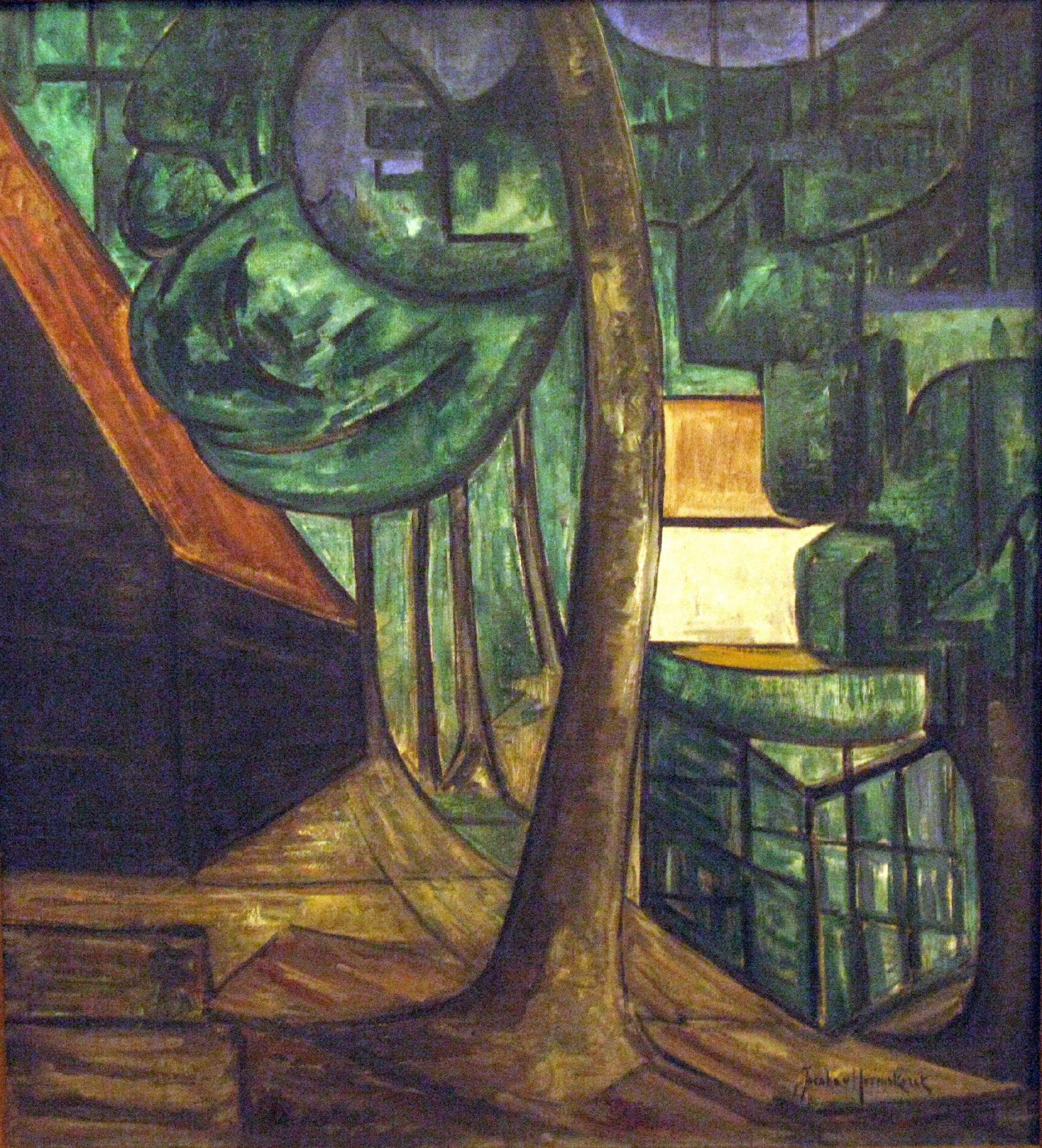 Jacoba van Heemskerck, Landschap, 3878 Landschap, Jacoba van Heemskerck, ca. 1913